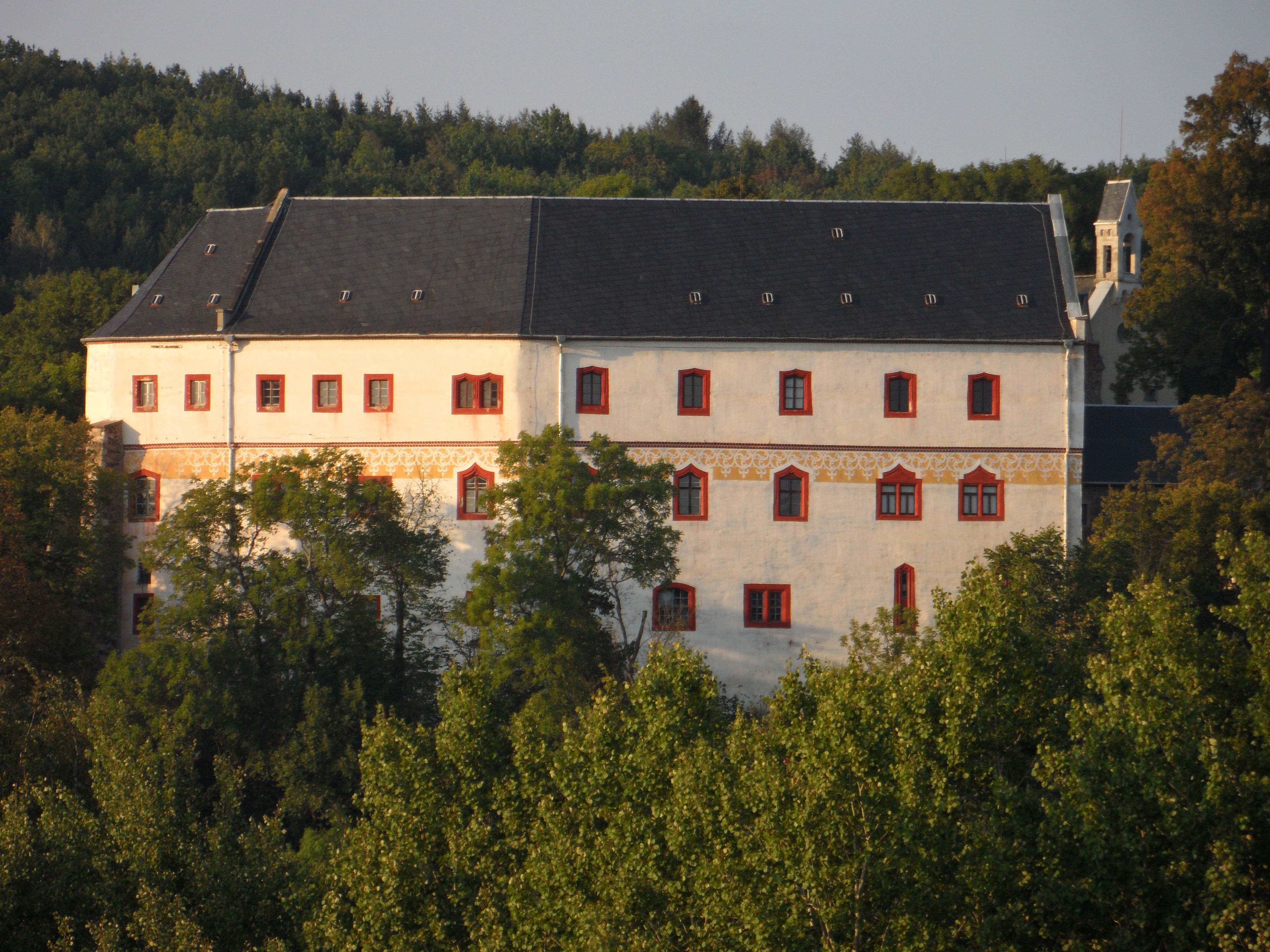 Schloss Sachsenburg September 2014